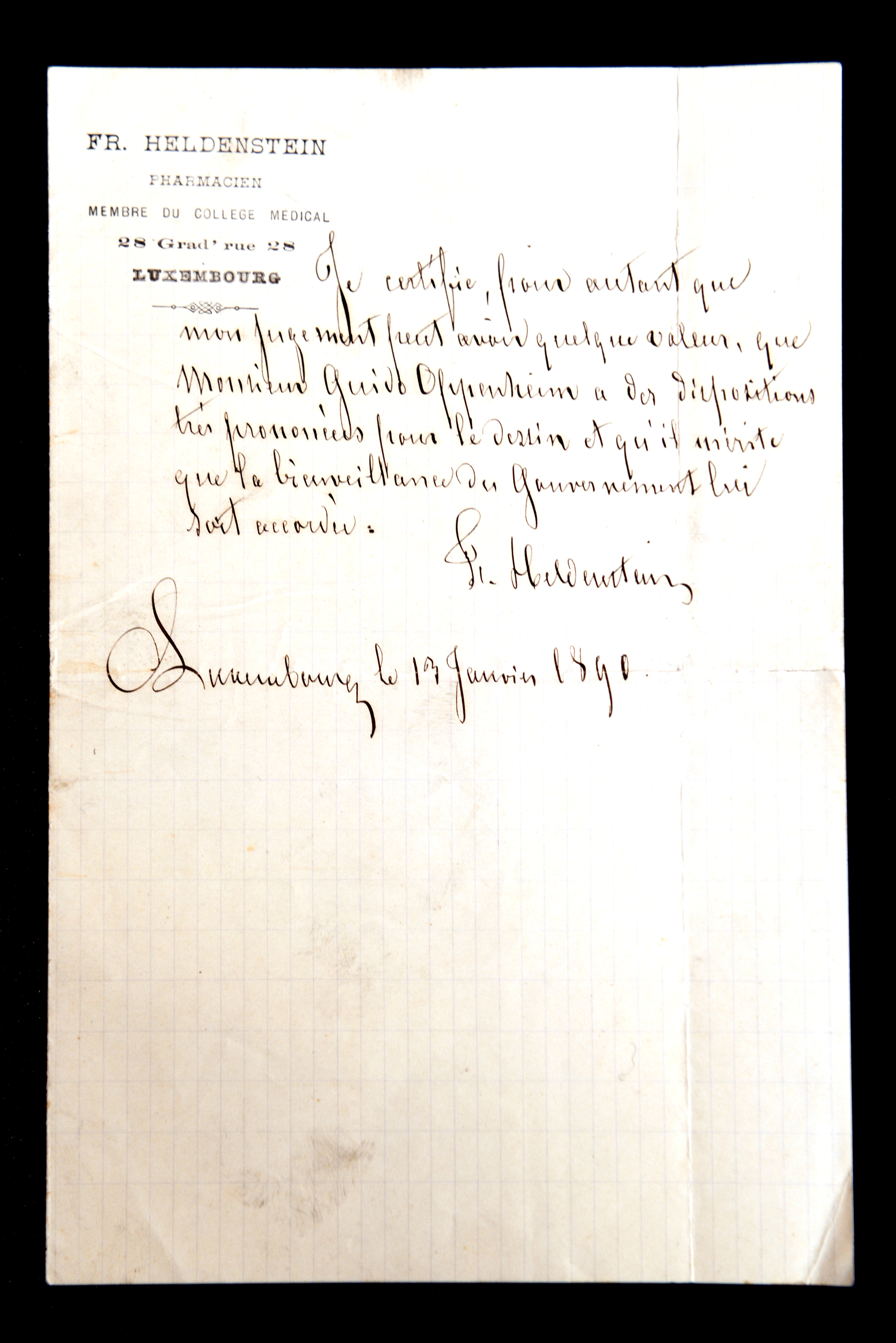 E Recommendationsschreiwe vum François Heldenstein fir den deemools 27 Joer ale Guido Oppenheim.